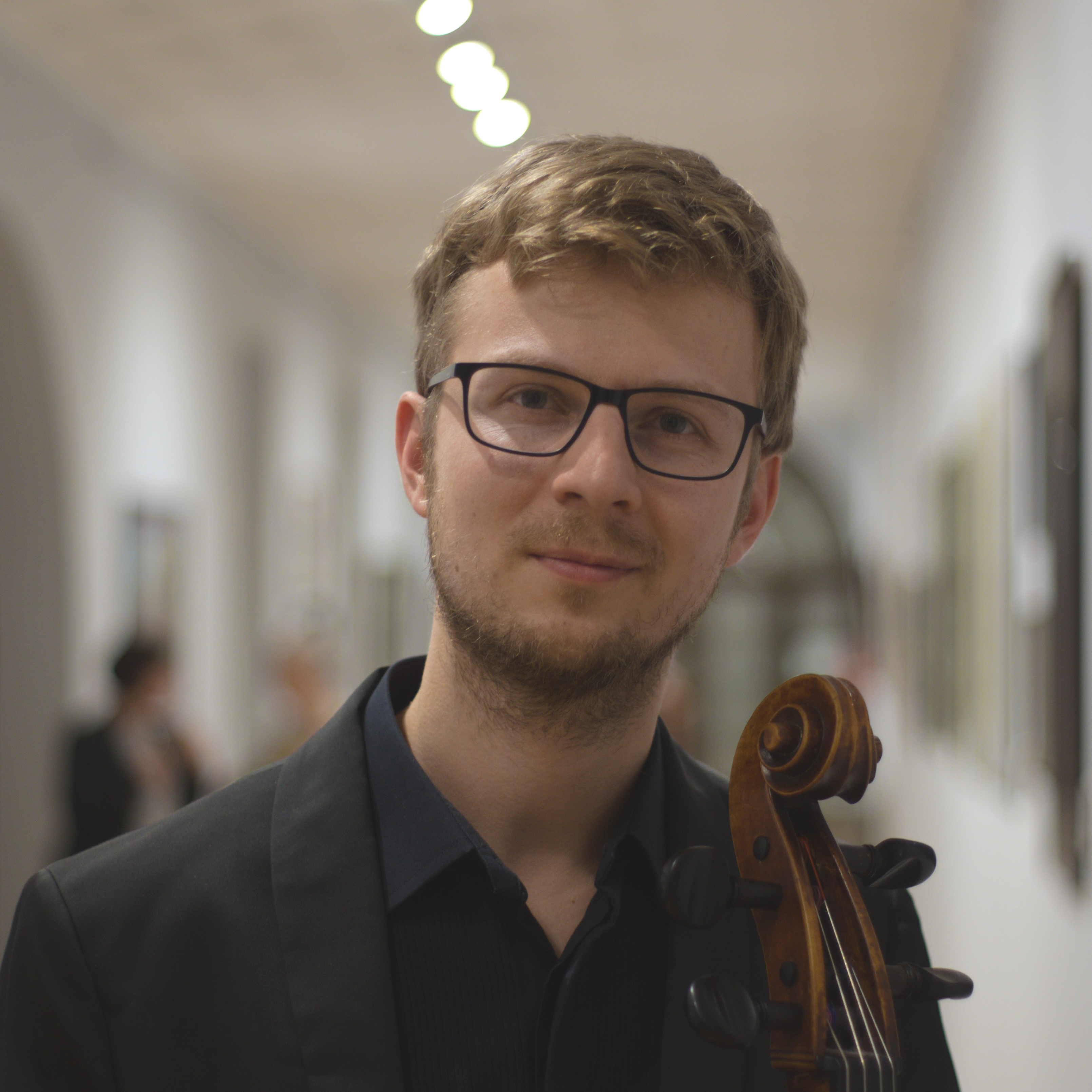 Zdjęcie wykonane za zgodą portretowanego przed jego koncertem w korytarzu Muzeum Archidiecezjalnym w Katowicach.